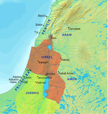 Judské a izraelské království v 1. polovině 2. tisíciletí př. Kr. Disclaimer: With this statement DEMIS BV grants you permission to freely copy the PNG images returned by our server and use them for your own purposes, including web pages. We would appreciate a reference to our server but such a reference is not required, nor do we take responsibility for the accuracy or quality of the maps.